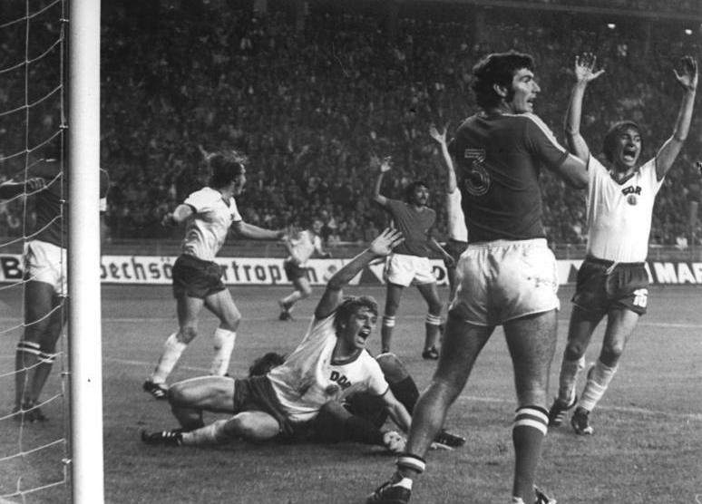 ADN-ZB-Mittelstädt-19.6.74-Westberlin: X. Fußball-Weltmeisterschaft 1. Finalrunde, Gruppe 1: DDR - Chile 1:1 am 18.6.74 Nach dem 1:0 für die DDR-Mannschaft in der 56. Spielminute jubeln die Spieler (v.l.) Joachim Streich, Torschütze Martin Herrmann und Harald Irmscher. Am Boden hinter Hoffmann, Torwart Leopoldo Vallejos. Nr.3 Alberto Quintano (beide Chile).